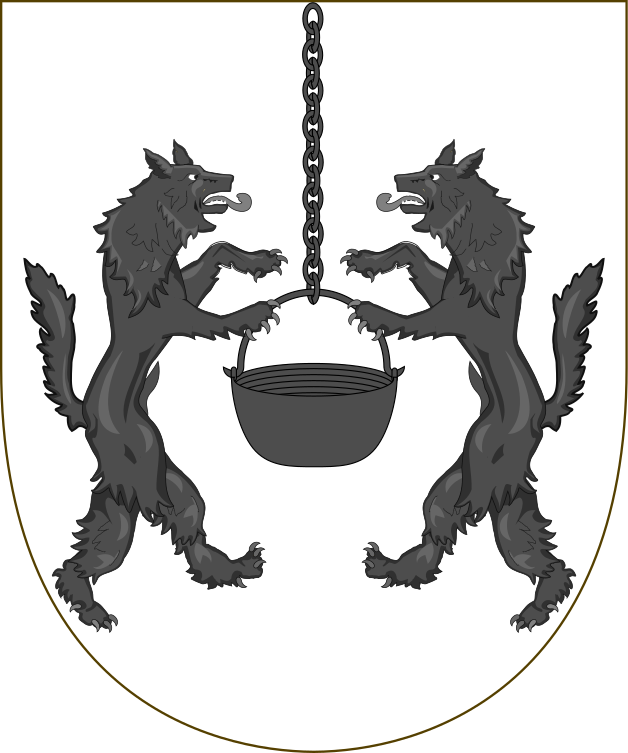 Escudo de Armas de la casa de Loyola